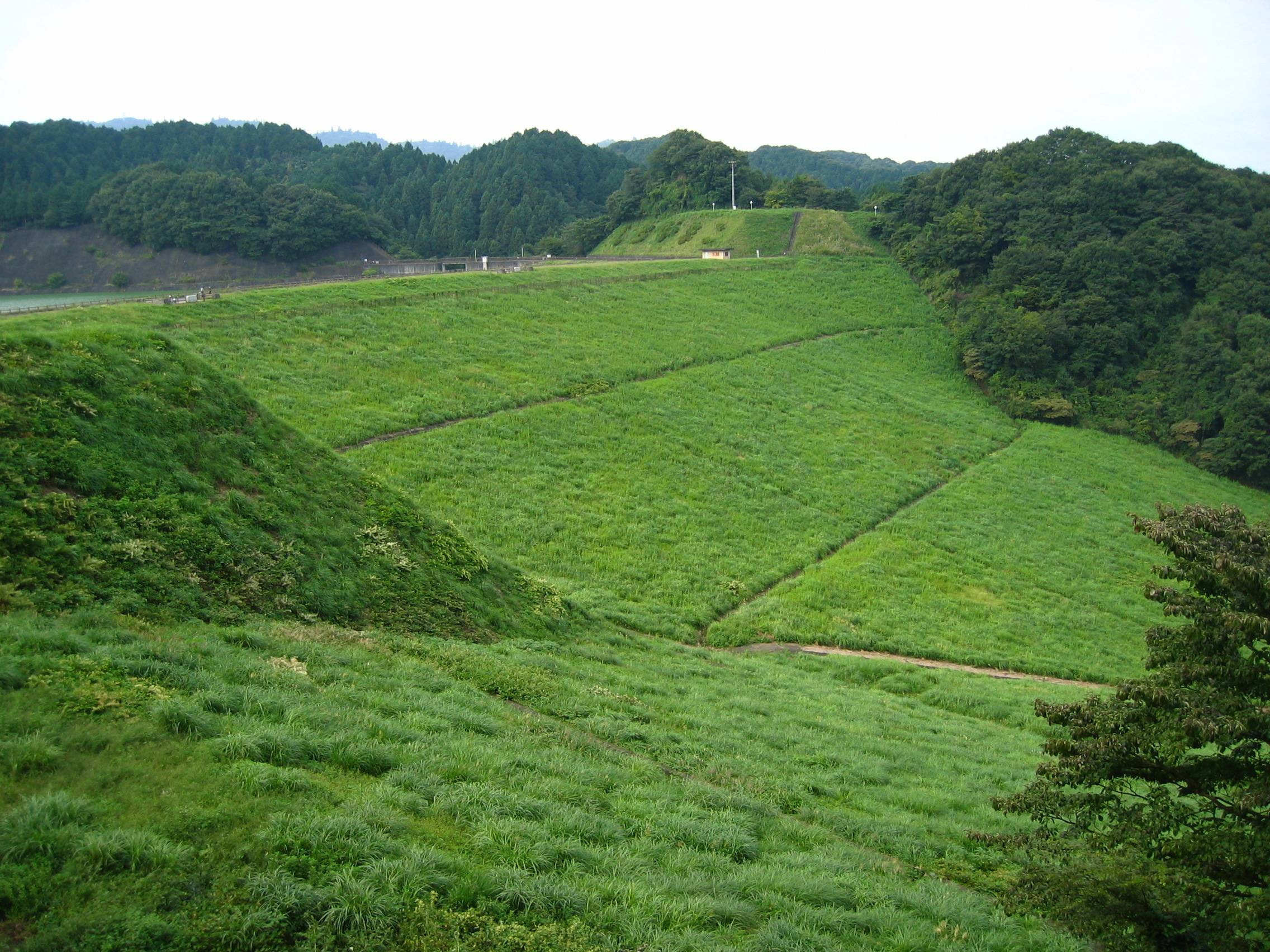 Honzawa Dam (本沢ダム) is a dam in Kanagawa prefecture, Japan.